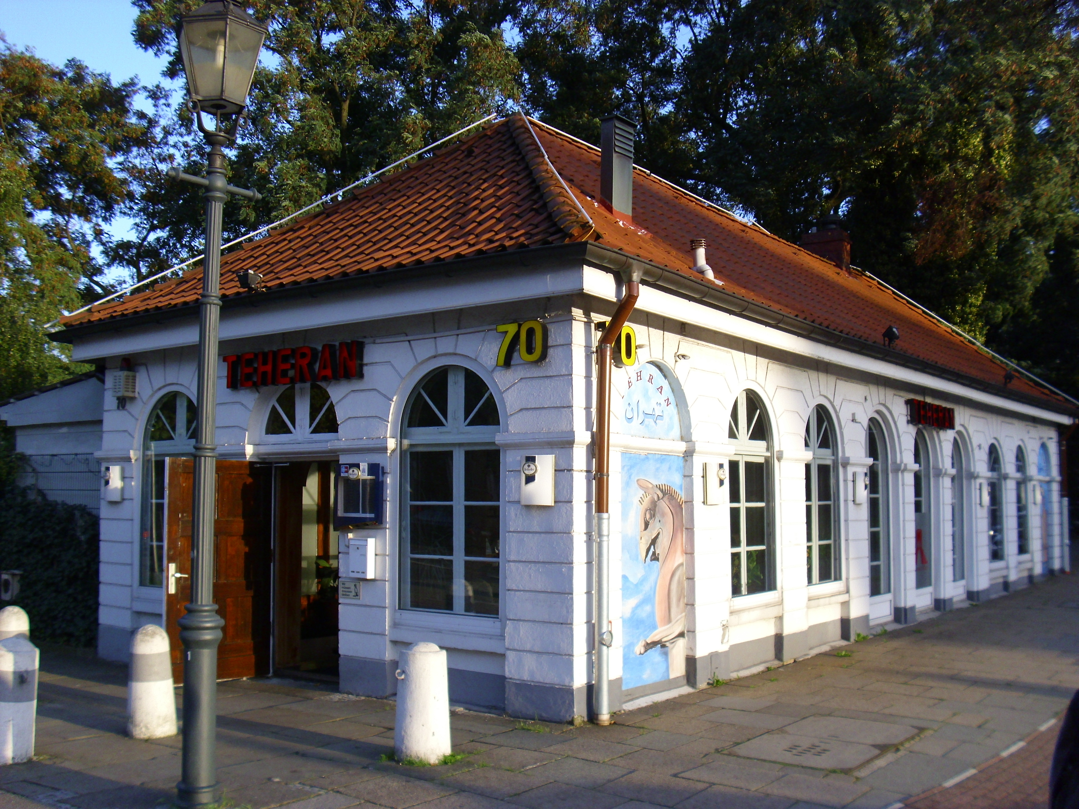 Adenauerallee 70, ehemaliges Wachhaus vor dem Steintor in Hamburg, erbaut 1818 von Carl Ludwig Wimmel This is a photograph of an architectural monument.